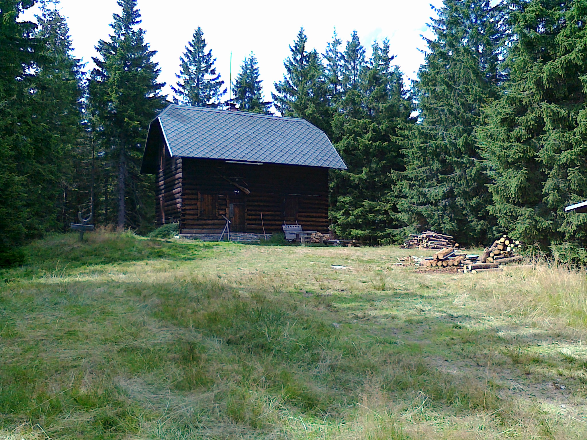 Połać szczytowa góry Troják-SZ - 1045 m n.p.m. z widoczną chatą o nazwie Durasova chata